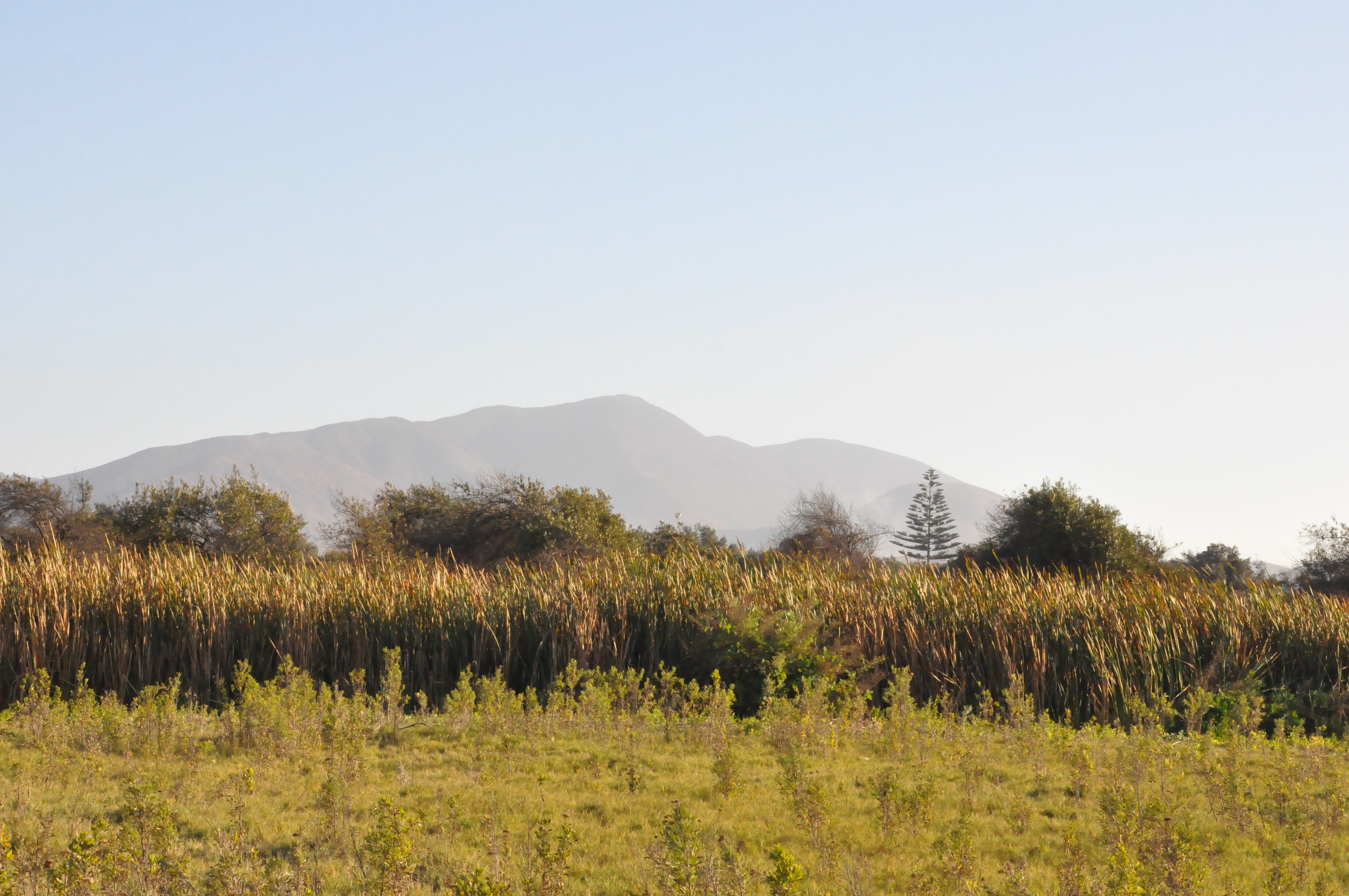 Paisaje junto al Humedal de Huasco Bajo